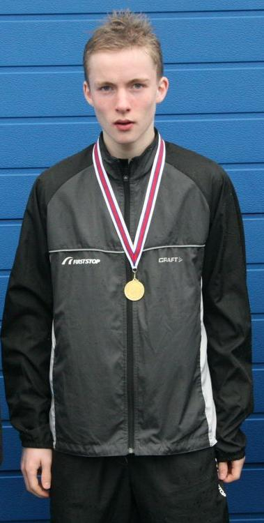 Føroyskt: Rúni Seloy.